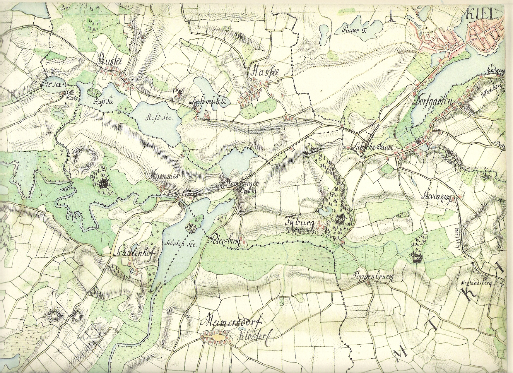 Ausschnitt aus der Karte (21). Aufgenommen in den Jahren 1789 bis 1796 unter der Direktion des Majors Gustav Adolf von Varendorf durch Offiziere des Schleswigschen Infanterieregiments (digitalisiert von Benutzer:Karlheinz_H)